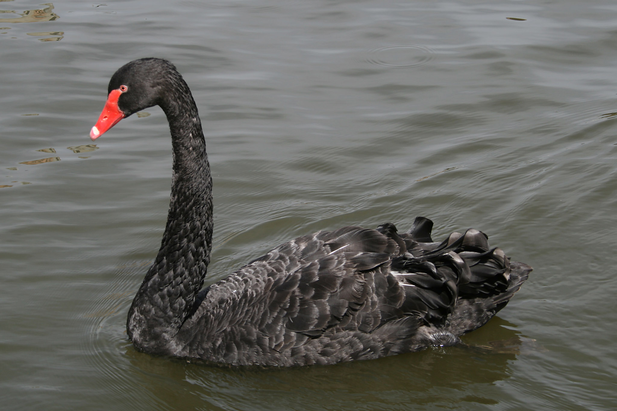 Cygnus atratus, Australia